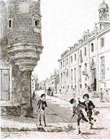 Lavis